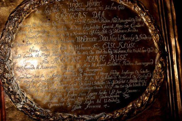 Mindeplade for Gregers Daa og Hustru. Foto Jim Michael Daae